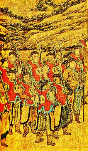 Картина - цинские воины гвардии бэйлэ Юэто.